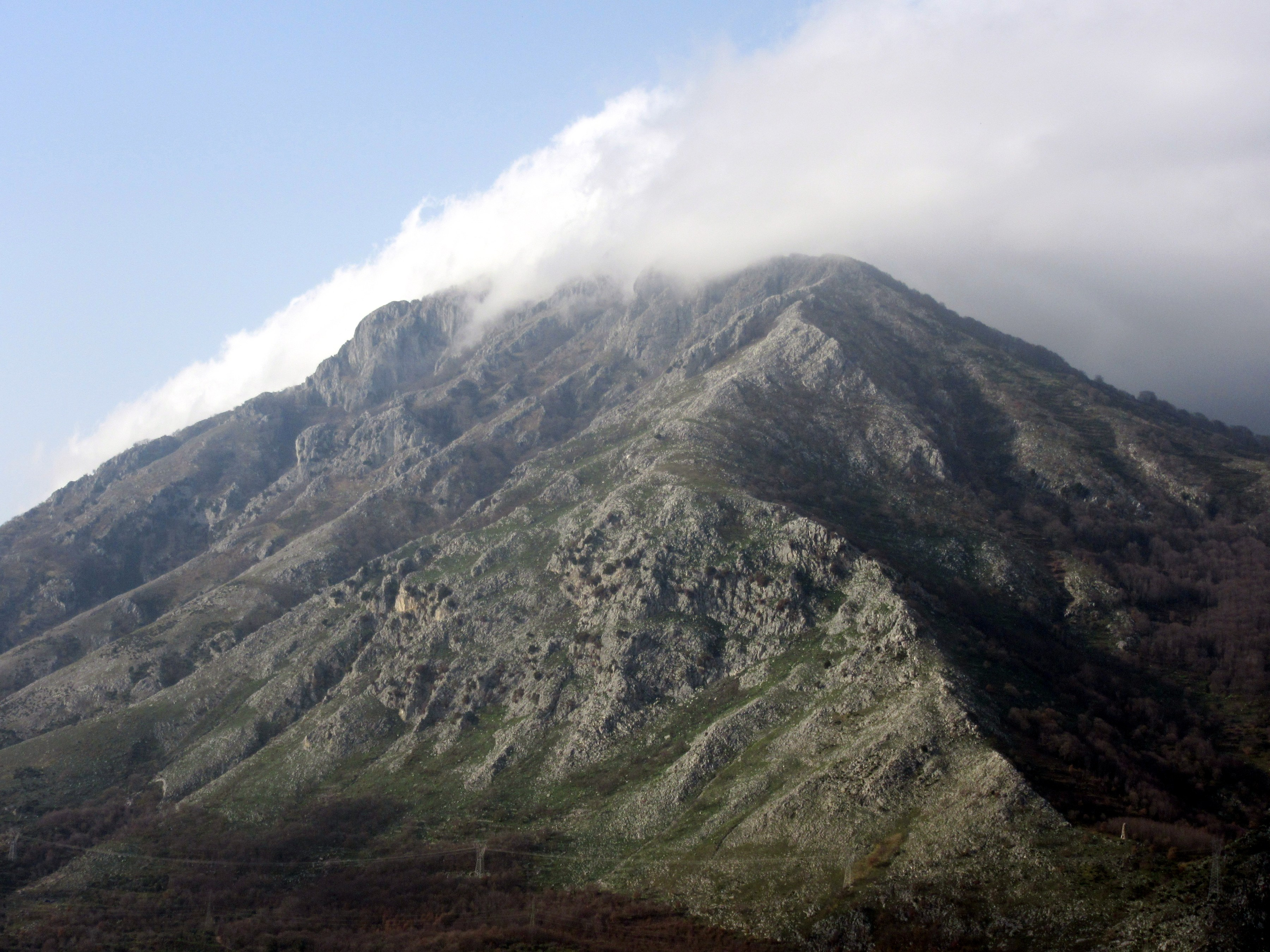 Monte Taburno, Montesarchio (BN)